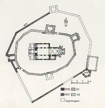 Planul fortificatiei din Caţa.